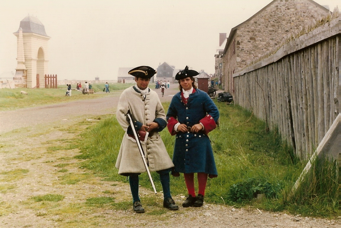 Soldats à Louisbourg